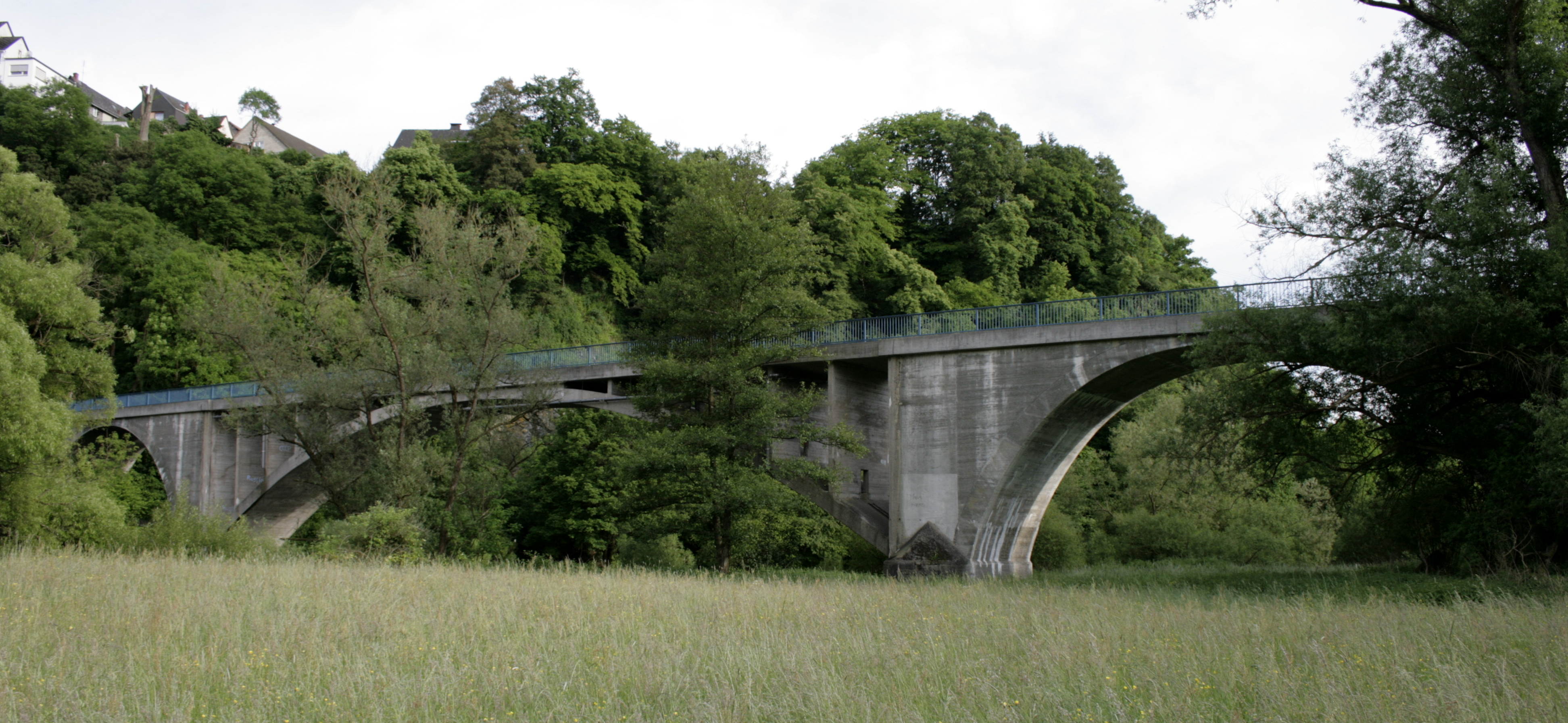 Lahnbrücke zwischen Wirbelau und Gräveneck, Deutschland